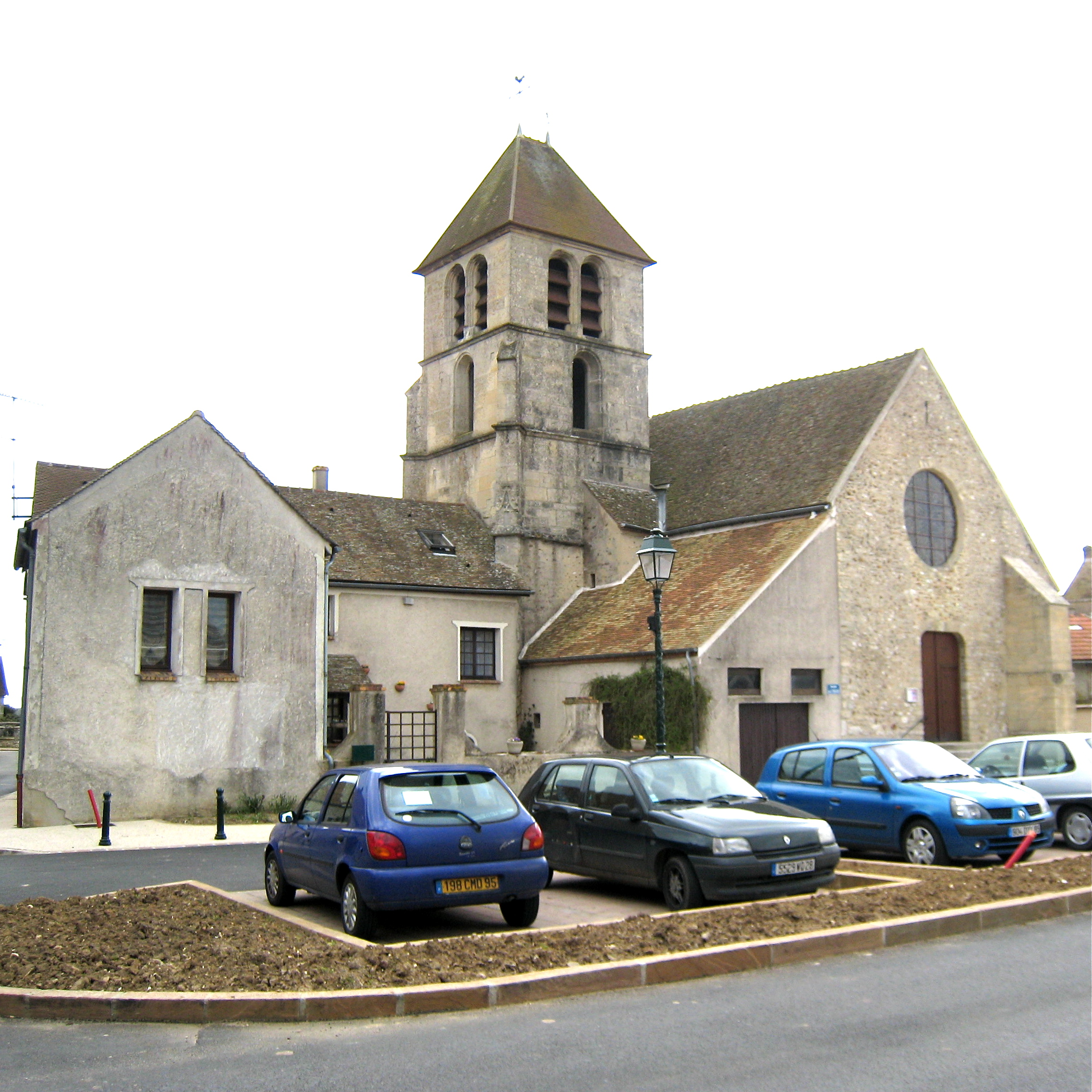 Eglise de Boinville en Mantois, Yvelines, France